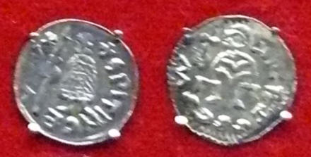 Denár Spytihněva II